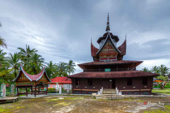 Masjid Lubuak Bauak